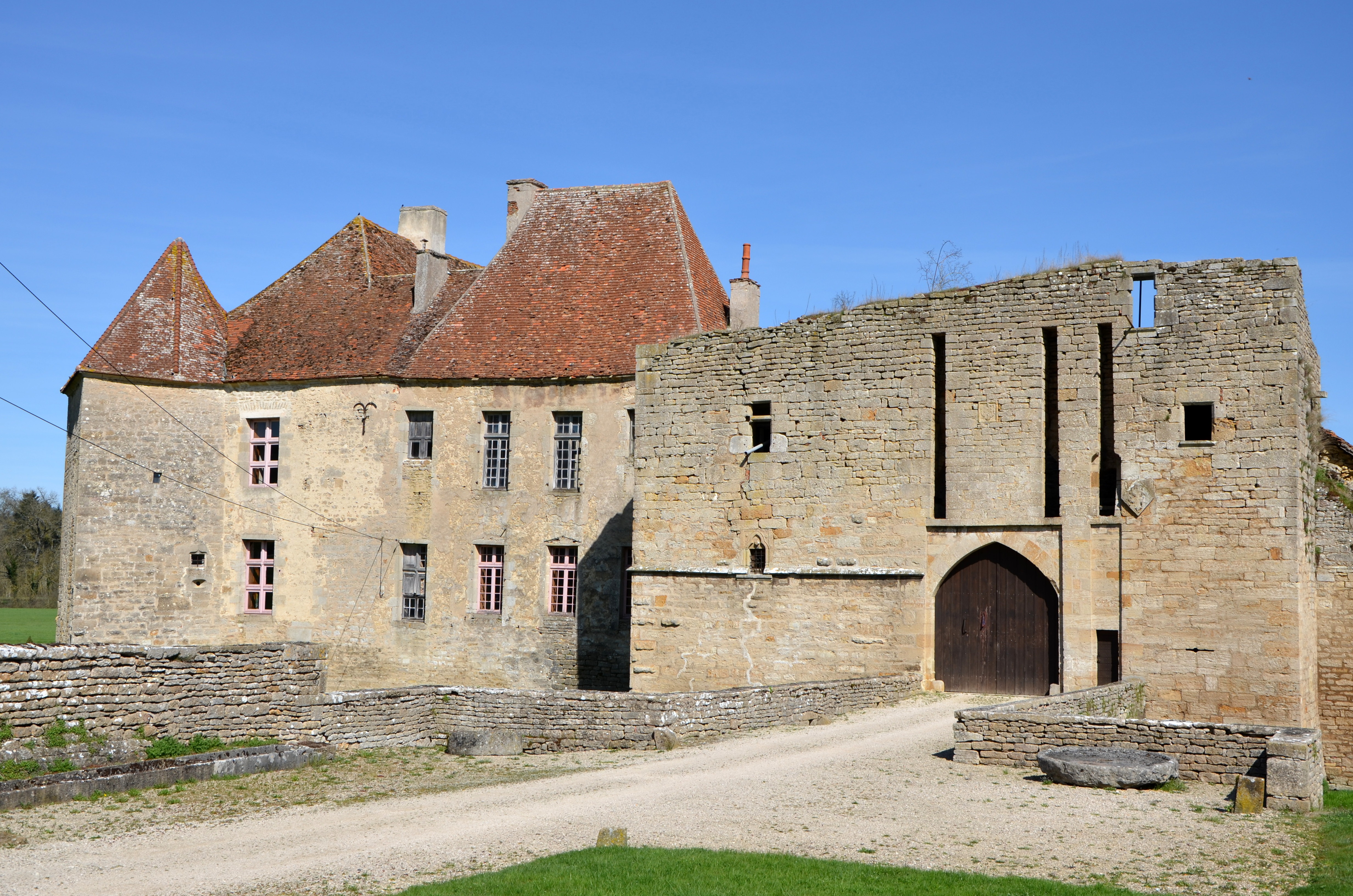 Château d'Éguilly, Côte d'Or, Bourgogne, France